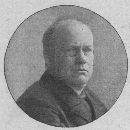 Der Schauspieler Albert Bauer im Jahr 1904